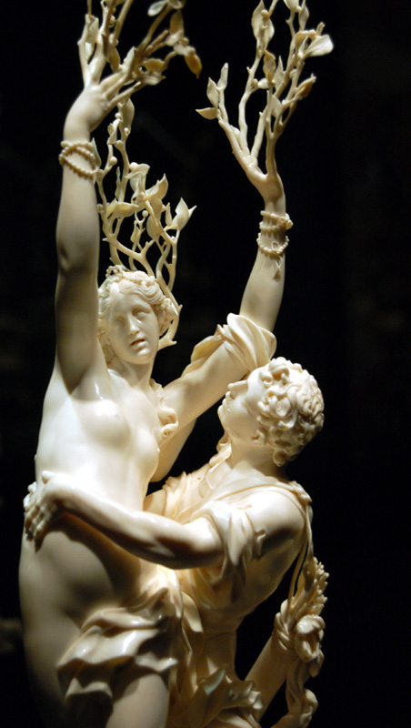 Apollo und Daphne. Wien. um 1688/90. Statuette. Elfenbein